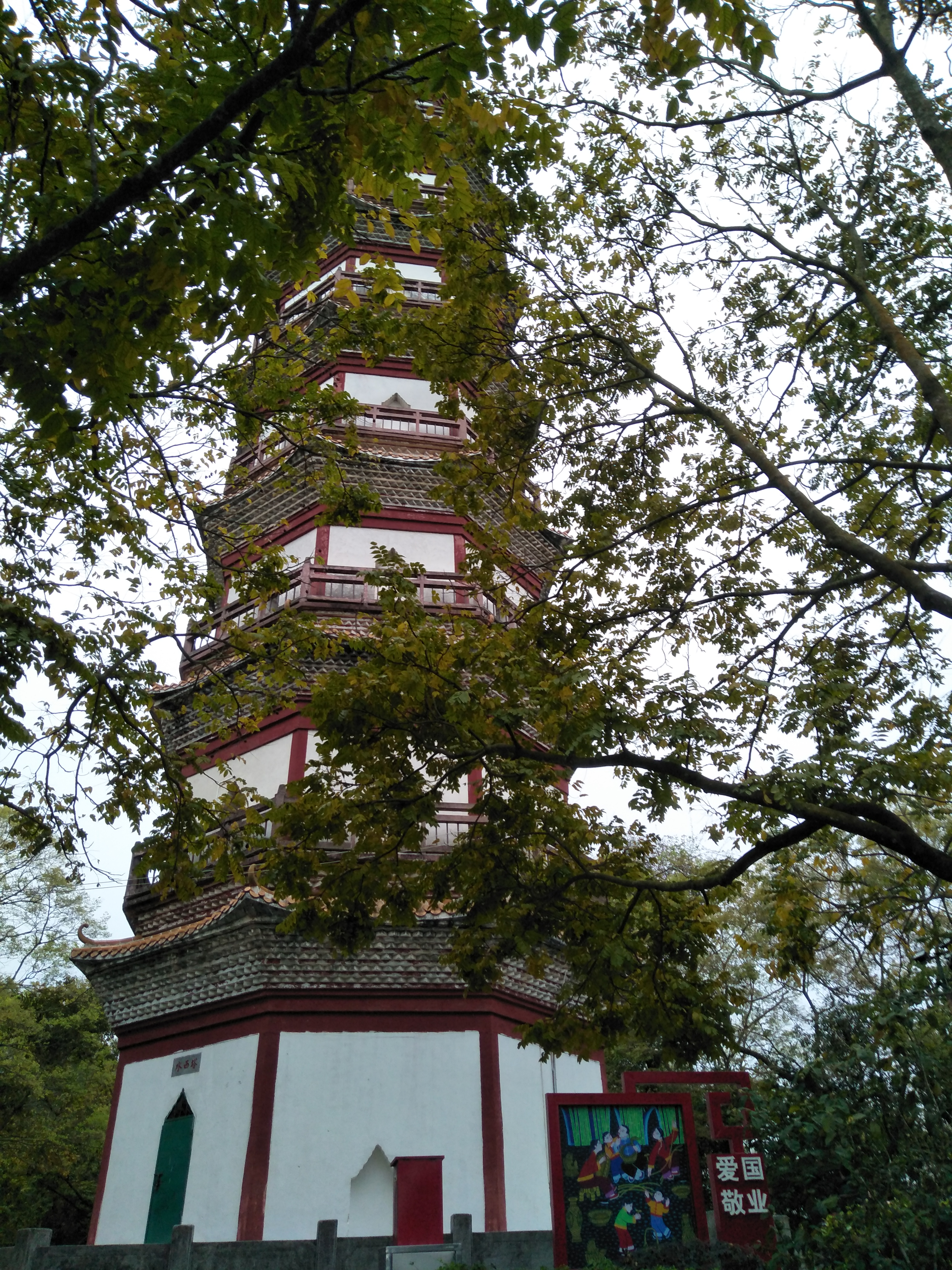 始建于明代的古塔，毁于“文化大革命”。1992年重建